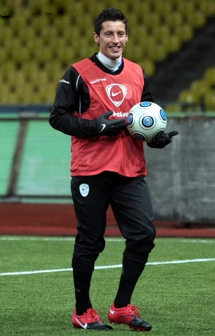 Robert Koren